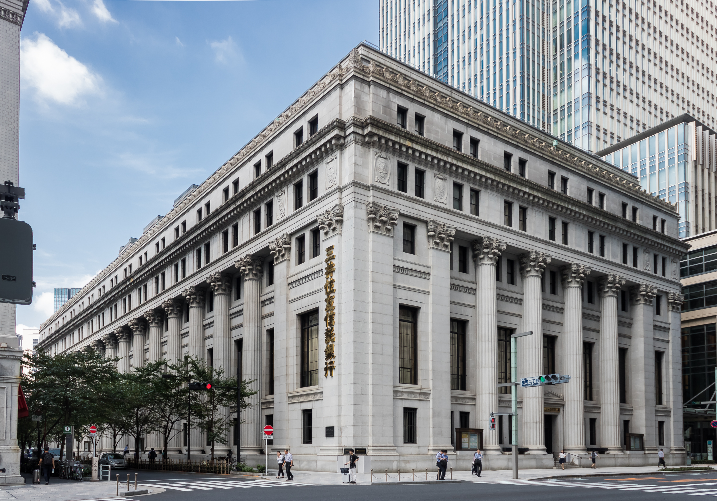 三井本館（重要文化財）